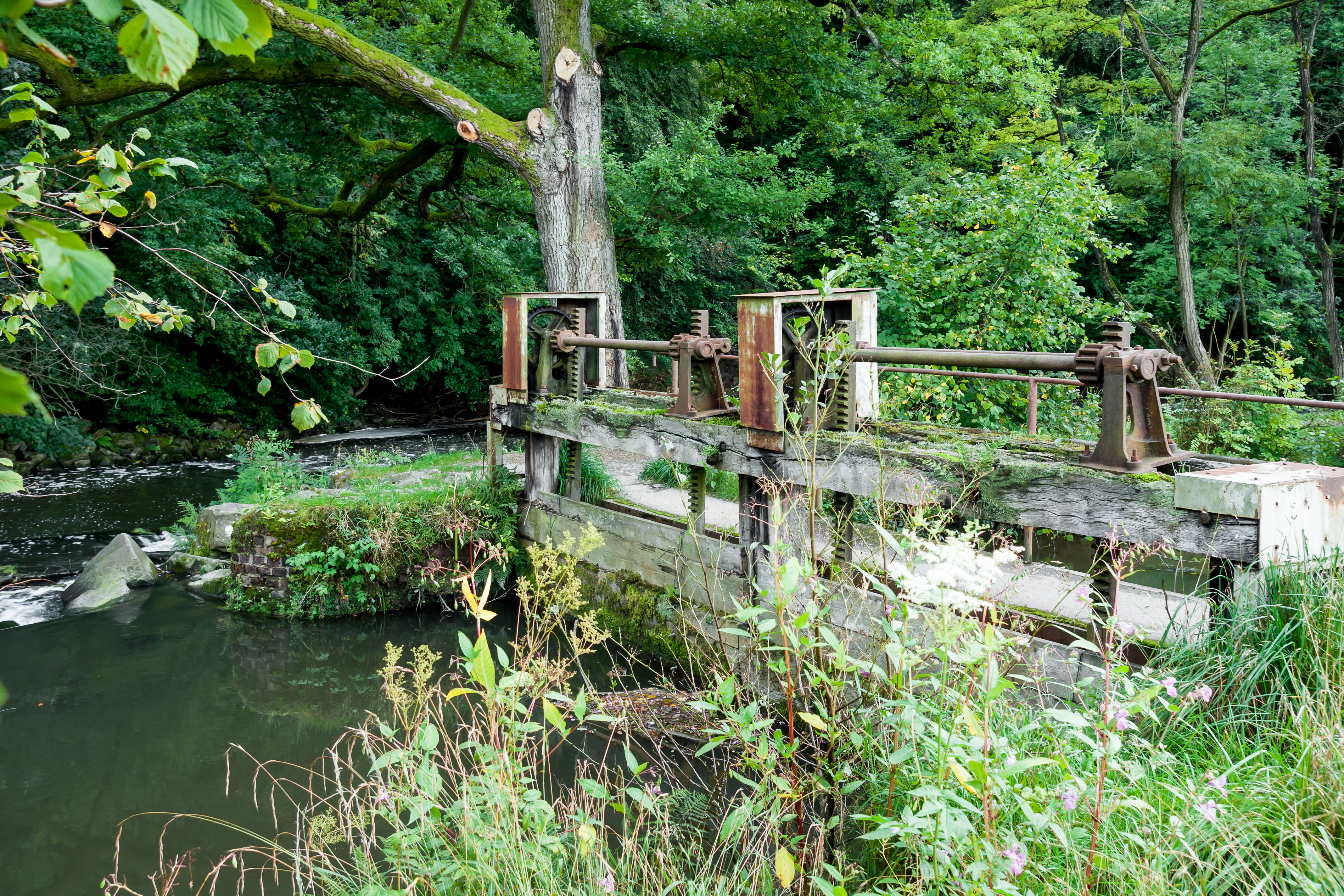 Rösrath, Denkmalnummer 85, Hauptstrasse 104, Turbinenanlage: Retaining weir at the supply ditch This is a photograph of an architectural monument.